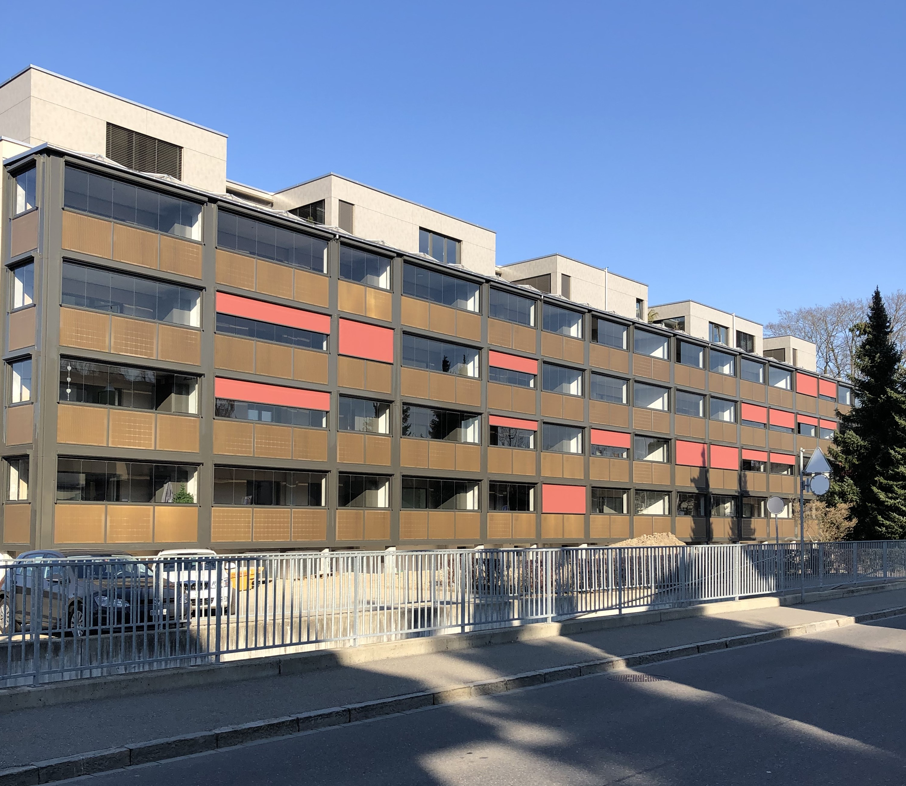 Stapfenacker Neubau